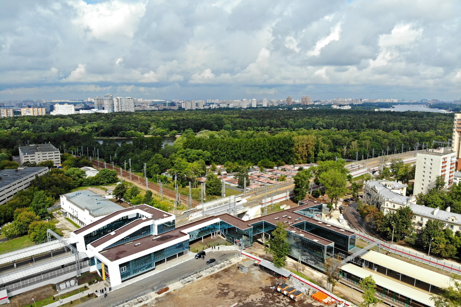 Открытие северного терминала ТПУ «Стрешнево» (С. Собянин, М. Хуснуллин)